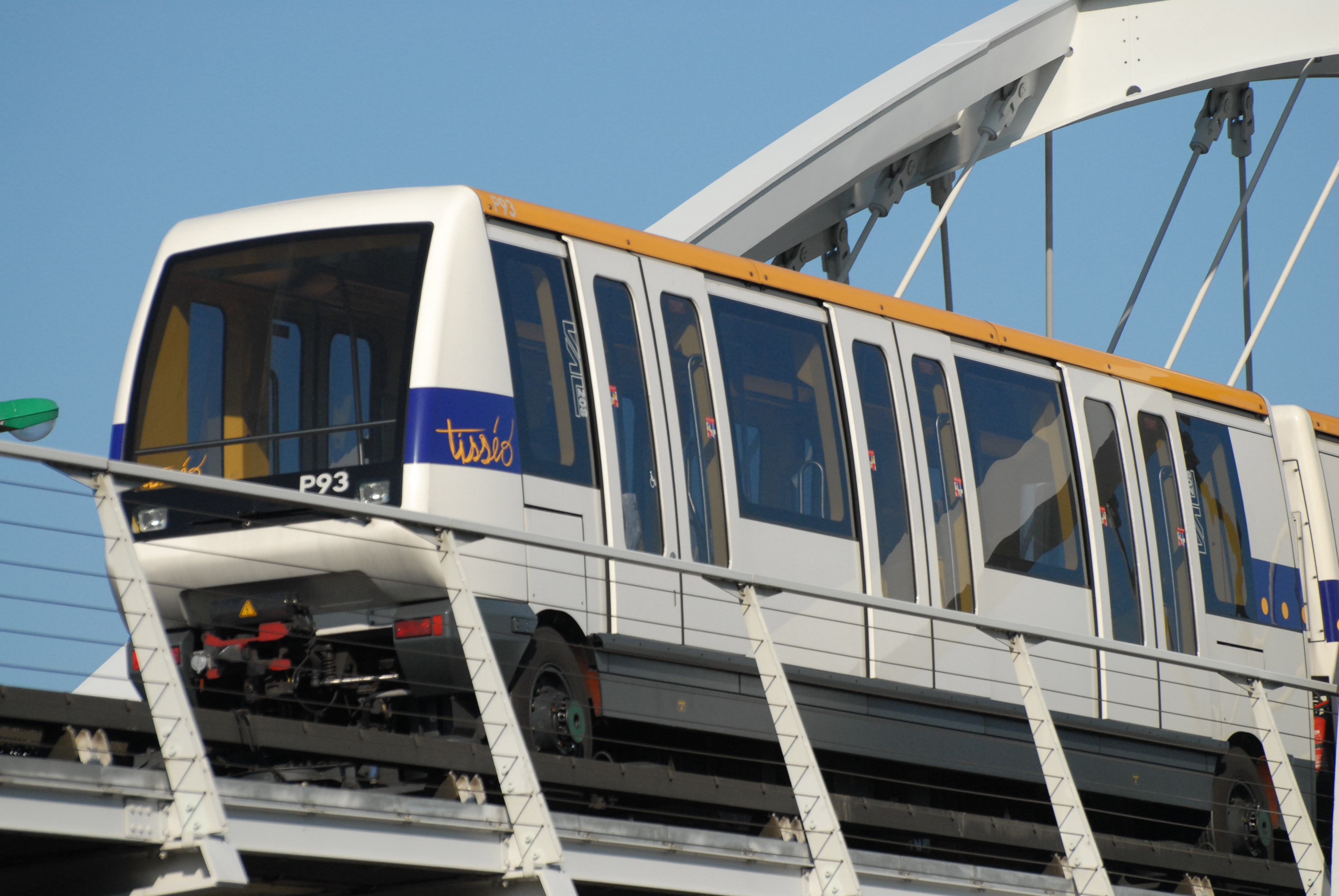 VAL 208 à Toulouse